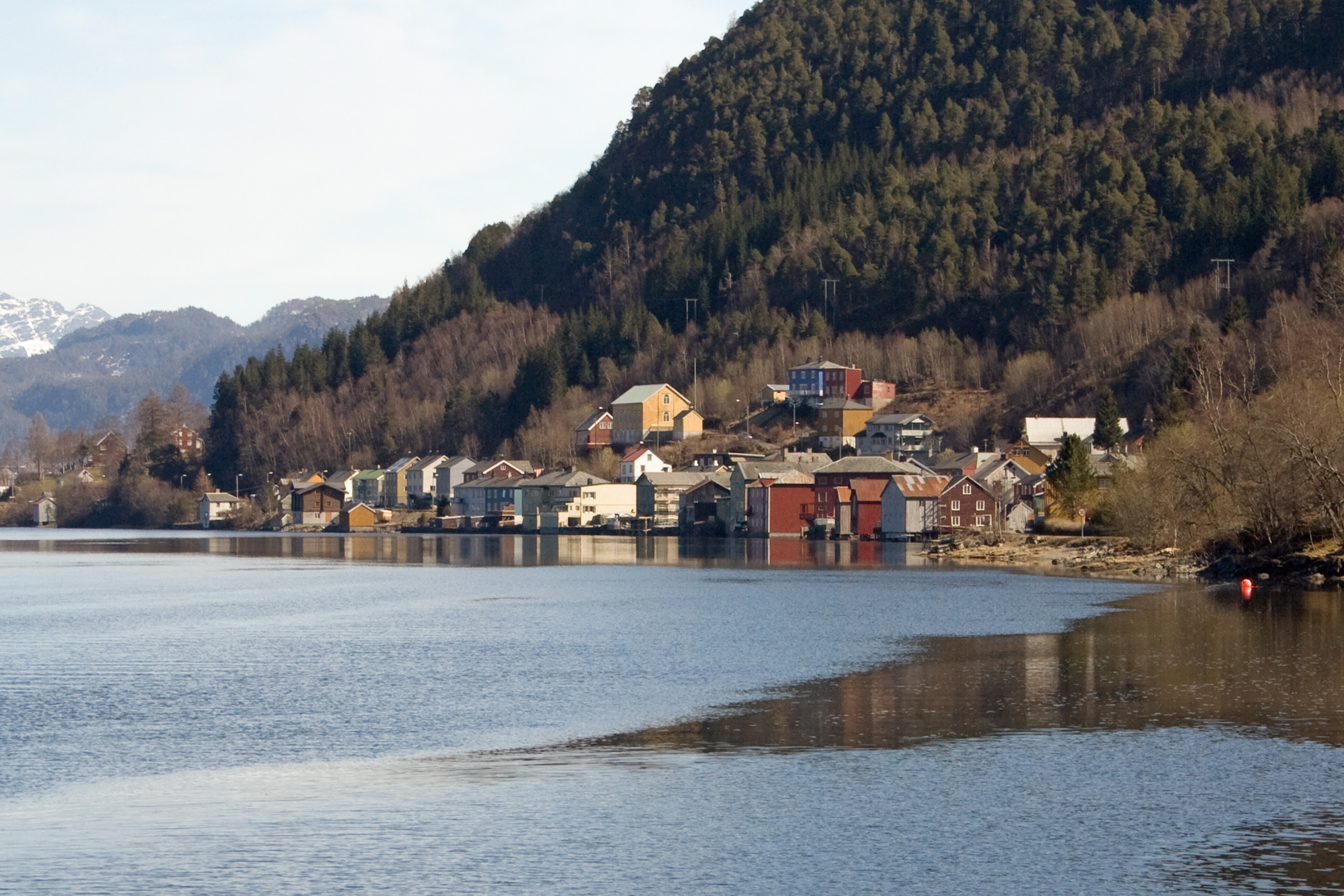 Surnadalsøra